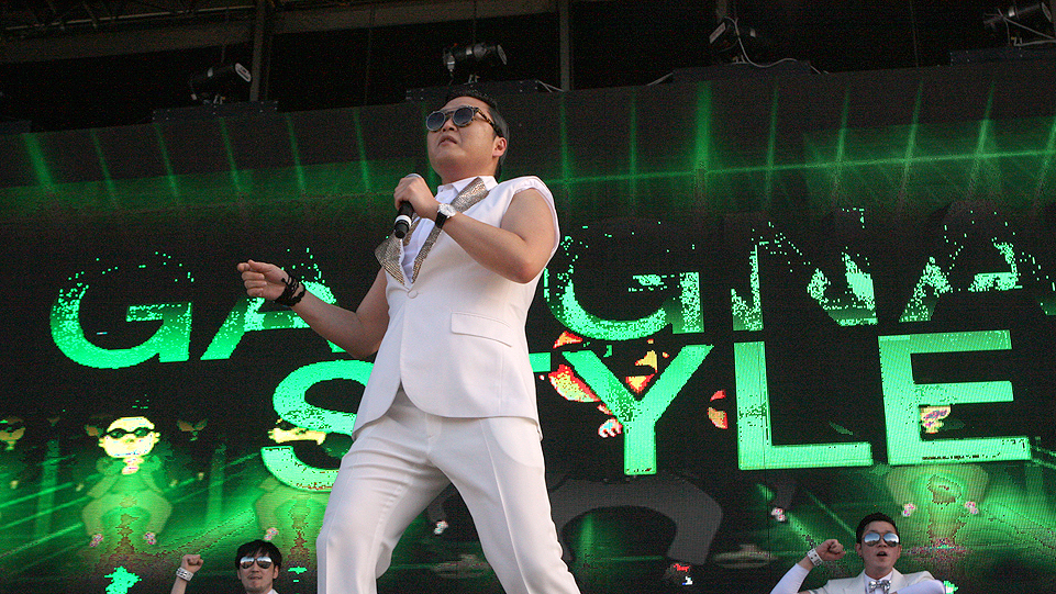 El cantante Psy interpretando "Gangnam Style" en el Future Music Festival 2013, realizado en Randwick, Sydney, Australia.